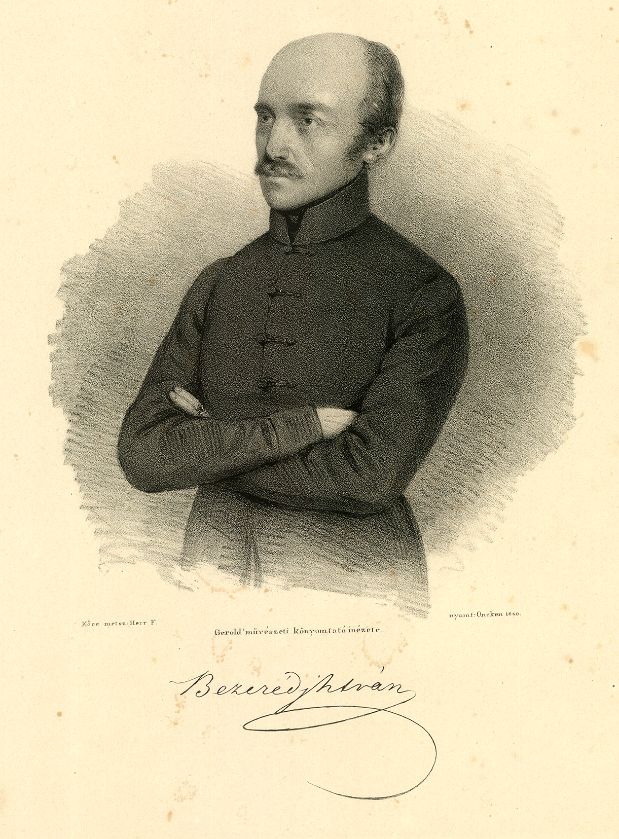 Bezerédj István, bezerédi (Szerdahely, 1796. október 28. – Hidja-puszta (Szedres mellett), 1856. március 6.) reformkori politikus, kiváló szónok.